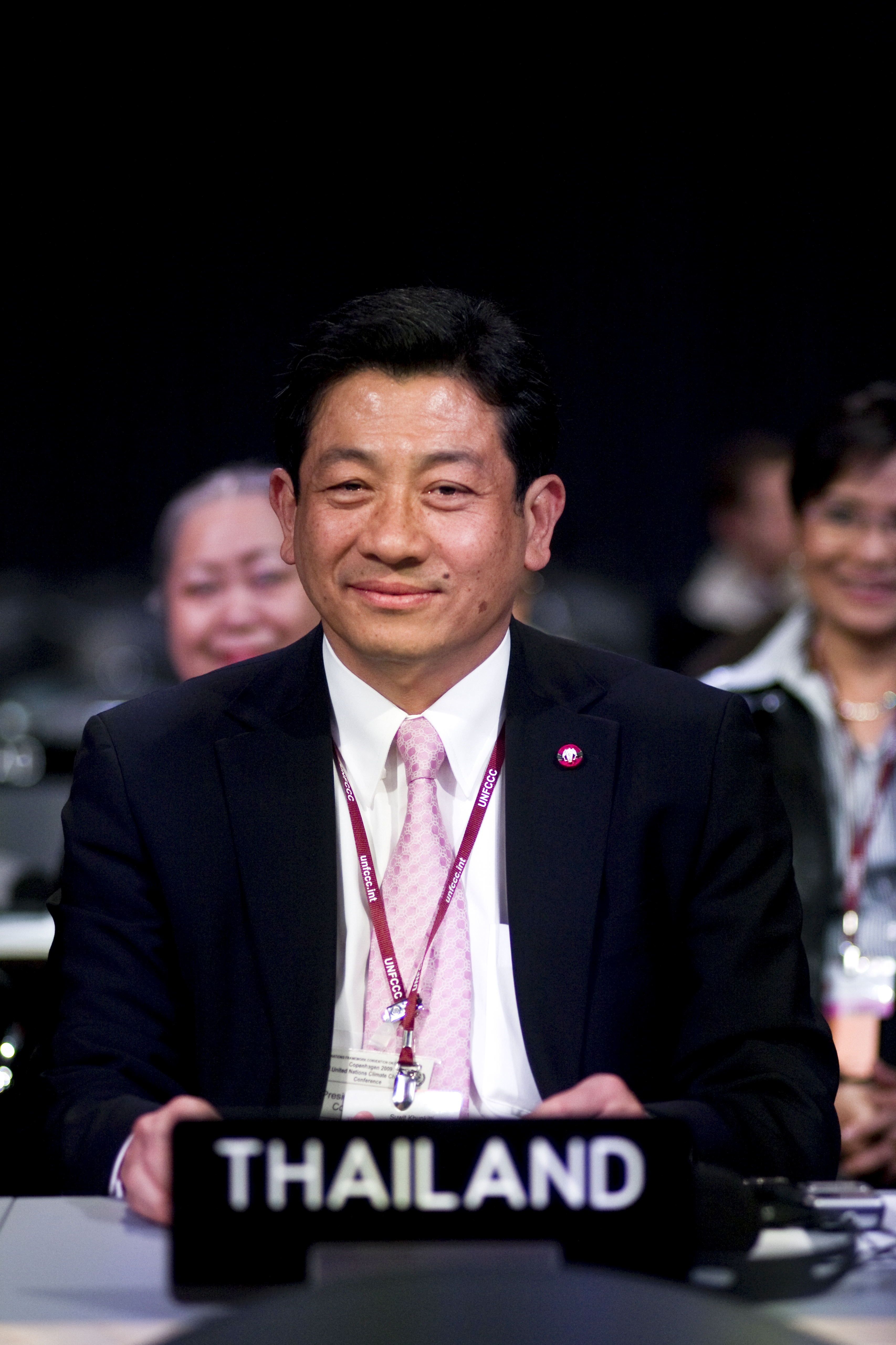 สุวิทย์ คุณกิตติ / นายกรัฐมนตรีและคณะ เข้าร่วมการประชุมระดับสูง High Level Segment ของรัฐภาคีภายใต้กรอบอนุสัญญาสหประชาชาติว่าด้วยการเปลี่ยนแปลงสภาพภูมิ อากาศสมัยที่ 15 และพิธีสารเกียวโตสมัยที่ 5 ณ Bella Center กรุงโคเปนเฮเกน ประเทศเดนมาร์ก 17ธันวาคม2552 (The Official Site of The Prime Minister of Thailand Photo by พีรพัฒน์ วิมลรังครัตน์)